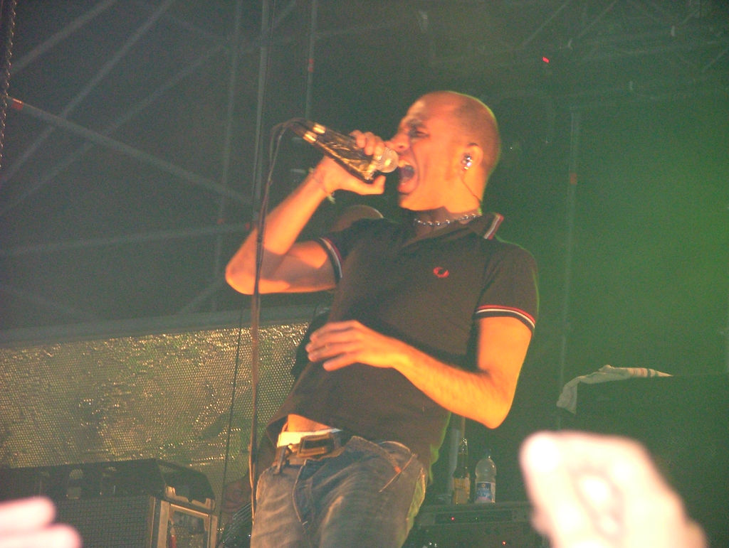 Subsonica live a Castagnole delle Lanze (AT) 31 agosto 2005